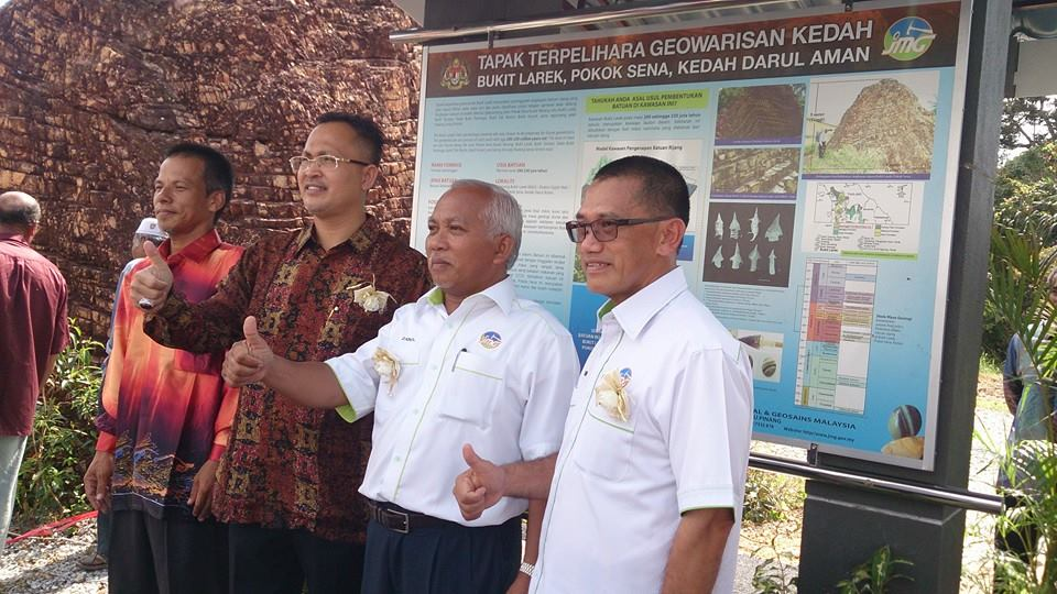 Geowarisan bukit larek jmg